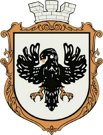 Герб Тячева